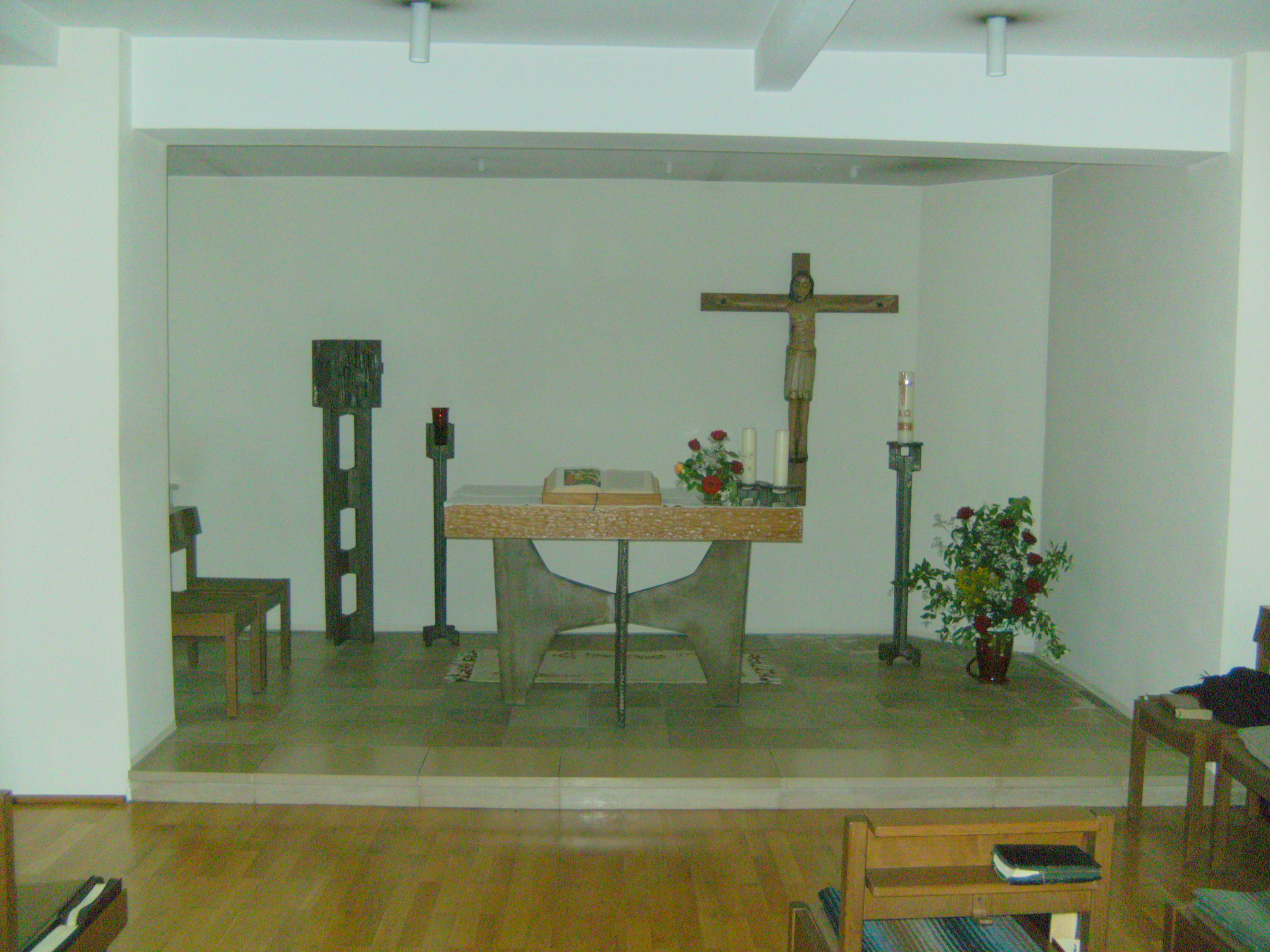 Der Edith-Stein-Karmel ist ein Frauenkarmelkloster des Teresianischen Karmel in Deutschland in Tübingen in Baden-Württemberg. Am 3. Dezember 1978 weihte der Bischof des Bistums Rottemburg-Stuttgart, Georg Moser, den Edith-Stein-Karmel in Tübingen ein. Das Gebäude ist unweit der Altstadt in der Neckarhalde hoch über dem Neckar gelegen.